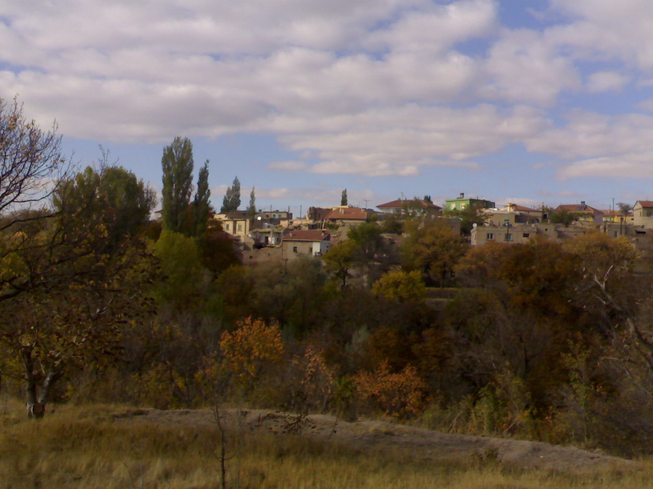 AĞIRNAS,KAYSERİ